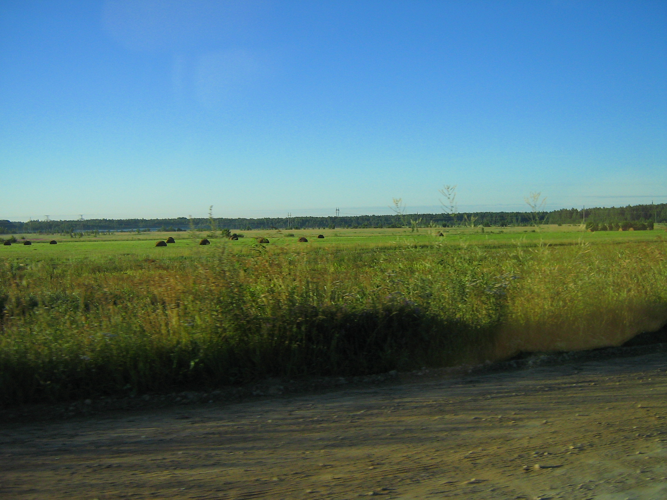 Колхозное поле